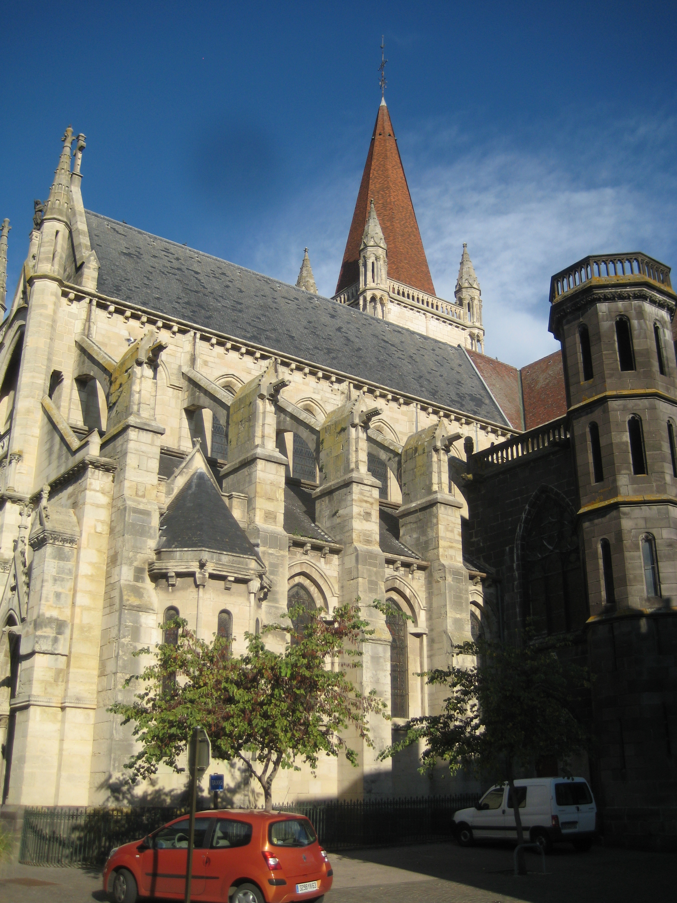 Église Notre-Dame d'Aigueperse